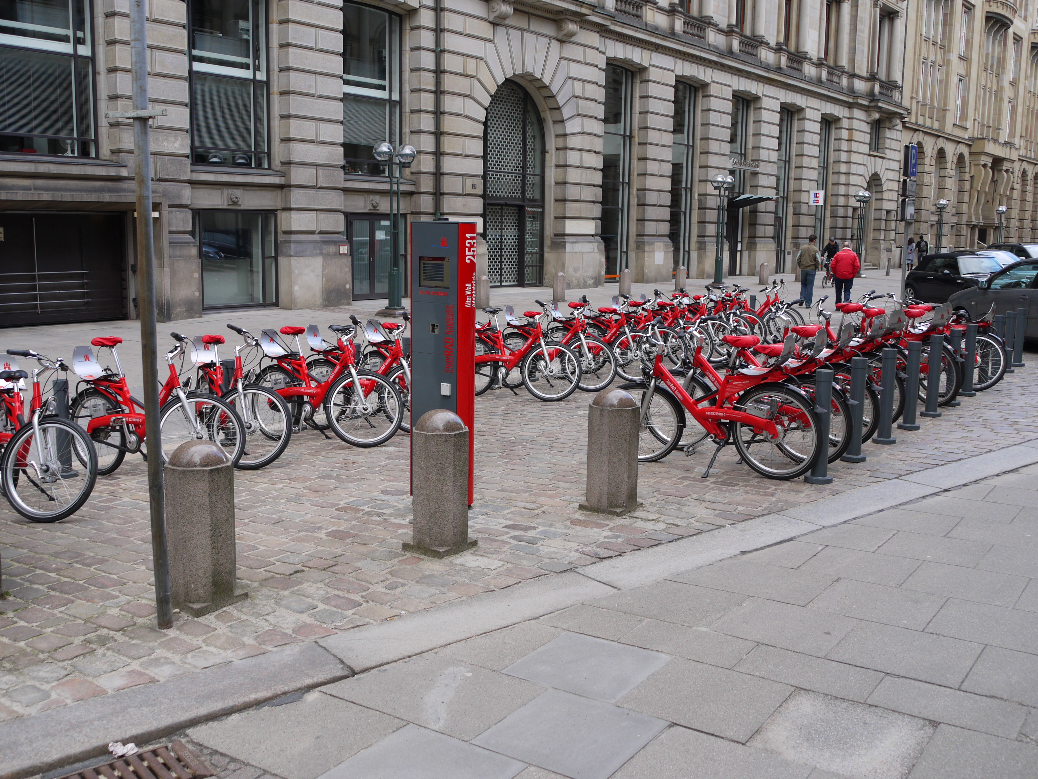 StadtRAD-Leihstation Hamburg, Kontorhaus Alter Wall 20 bis 22 ehemals Vereins und Westbank, Altstadt; 1900-1902; 1947-1952 Haller & Geißler; Elingius & Schramm. This is the photograph of an architectural monument. It is part of the list of cultural monuments of Hamburg, no. 13812, 13813